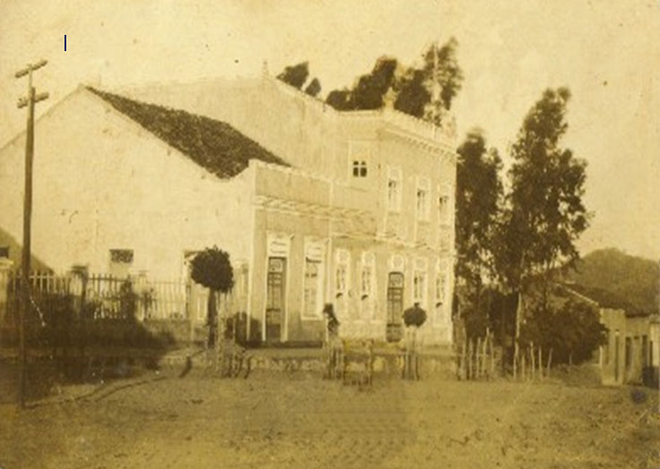 Sobrado dos Macieis localizado na cidade de Baturite, Estado do Ceara (década de 1920).